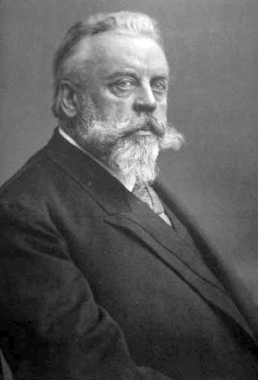 Веселовский, Алексей Николаевич